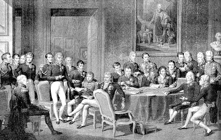 Immagine del Congresso di Vienna ricavata da wiki (vedi Congrès de Vienne).